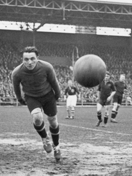 Voetbal interland, Nederland-België (uitslag 2-1). Foto; Een schot van Wim Lagendaal verdwijnt naast het doel van de Belgische doelman Louis Vandenbergh, Amsterdam, Nederland 17 april 1932